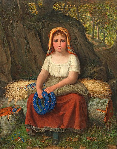 Rastendes Bauernmädchen mit Ähren und Kornblumenkränzen an einem Waldweg